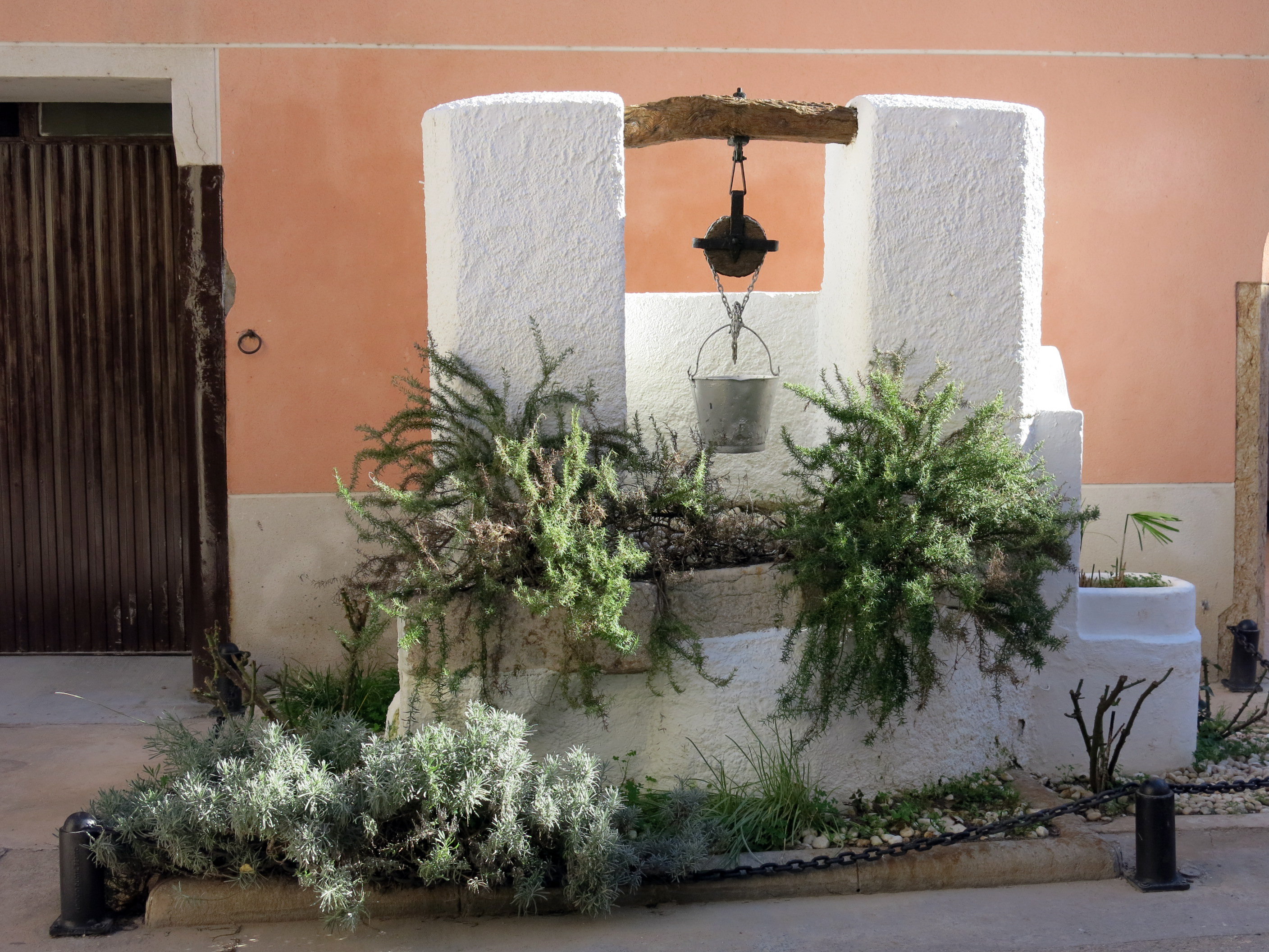 Plaça del Platger (Tortosa)